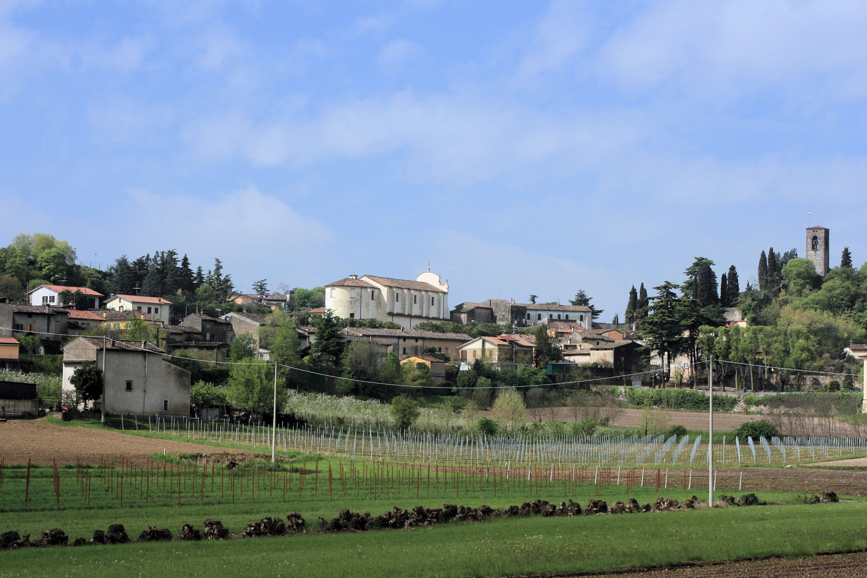 Cavriana panorama